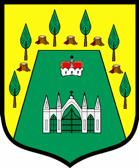 Herb gminy Staroźreby